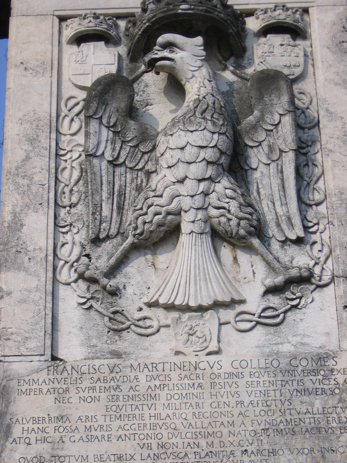 Castello di Cavernago, Bergamo, Italia